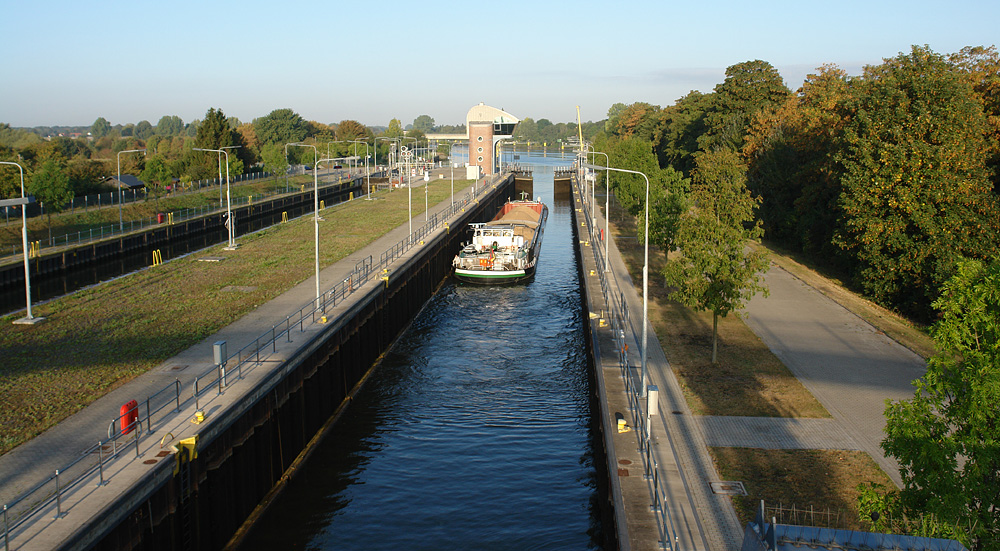 Weserwehr in Bremen bei Weserkilometer 362. Kammer der Großschifffahrtsschleuse. Links die Kammer der Kleinschifffahrtsschleuse, im Hintergrund das Schleusenbetriebsgebäude